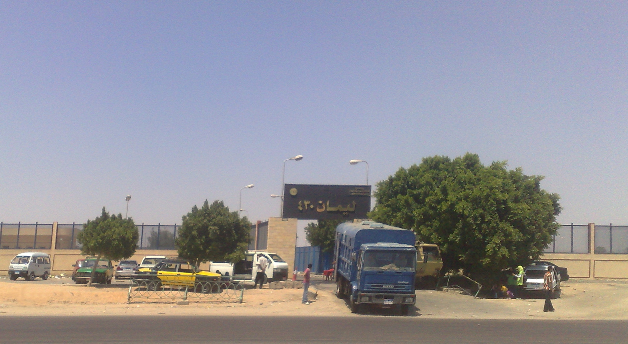 ليمان 430، منطقة سجون وادي النطرون، مدينة السادات